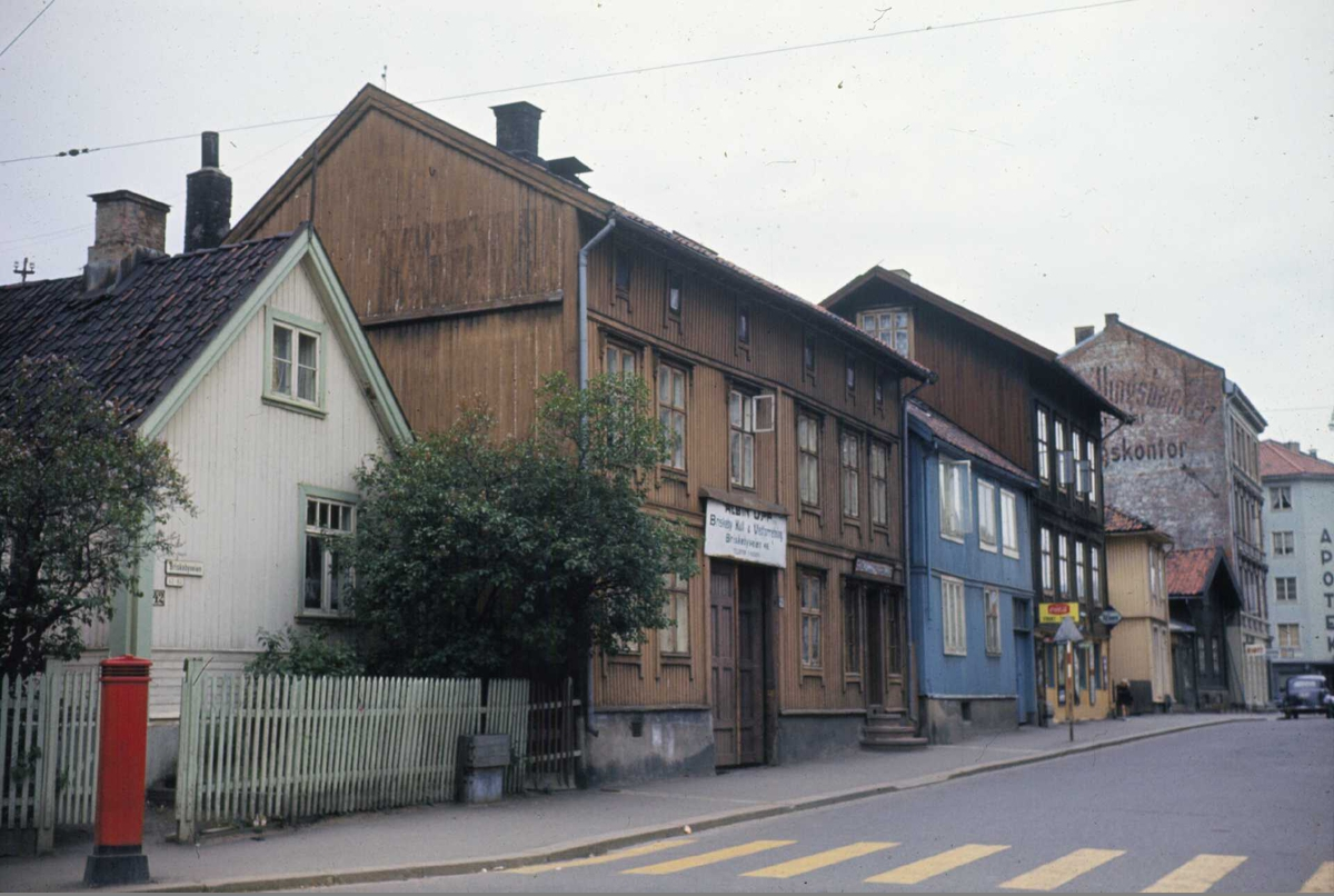 Briskeby kull- og vedforretning (Albin Upp) i Briskebyveien 46 med nabobygg. Tekst hos Oslo Museum: «trehusbebyggelse, hage, stakitt, Briskeby kull- og vedforretning (Albin Upp), bygård, gavlvegg». Foto: Lise Skabo Hove, 1964. Fra Byhistorisk samling hos Oslo Museum.